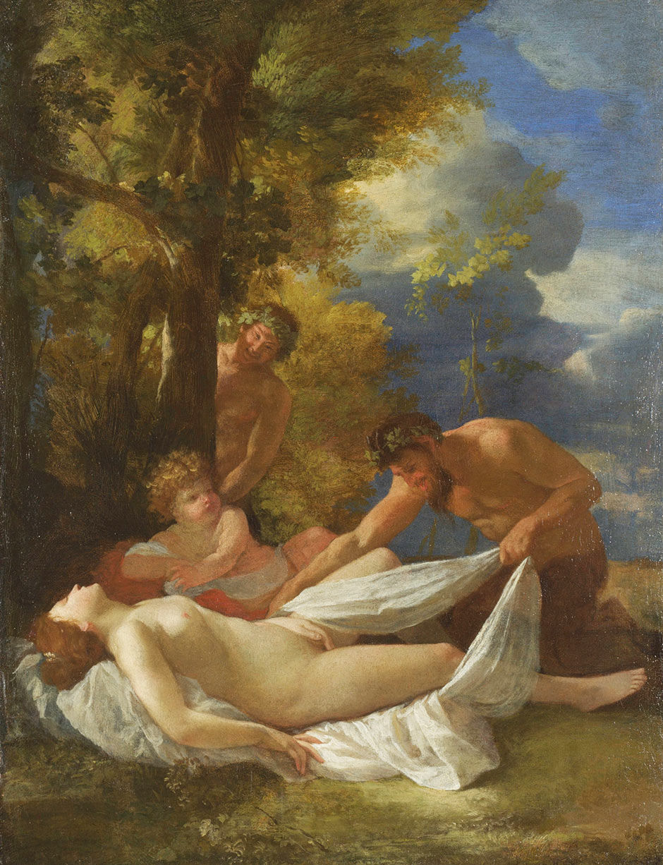 Nymph and satyr